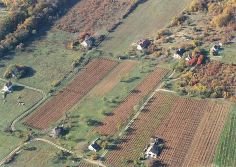 Vinberejoj en Balatonakali.